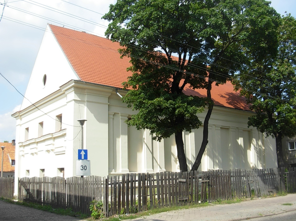 Dawna synagoga żydowska w Bydgoszczy-Fordonie